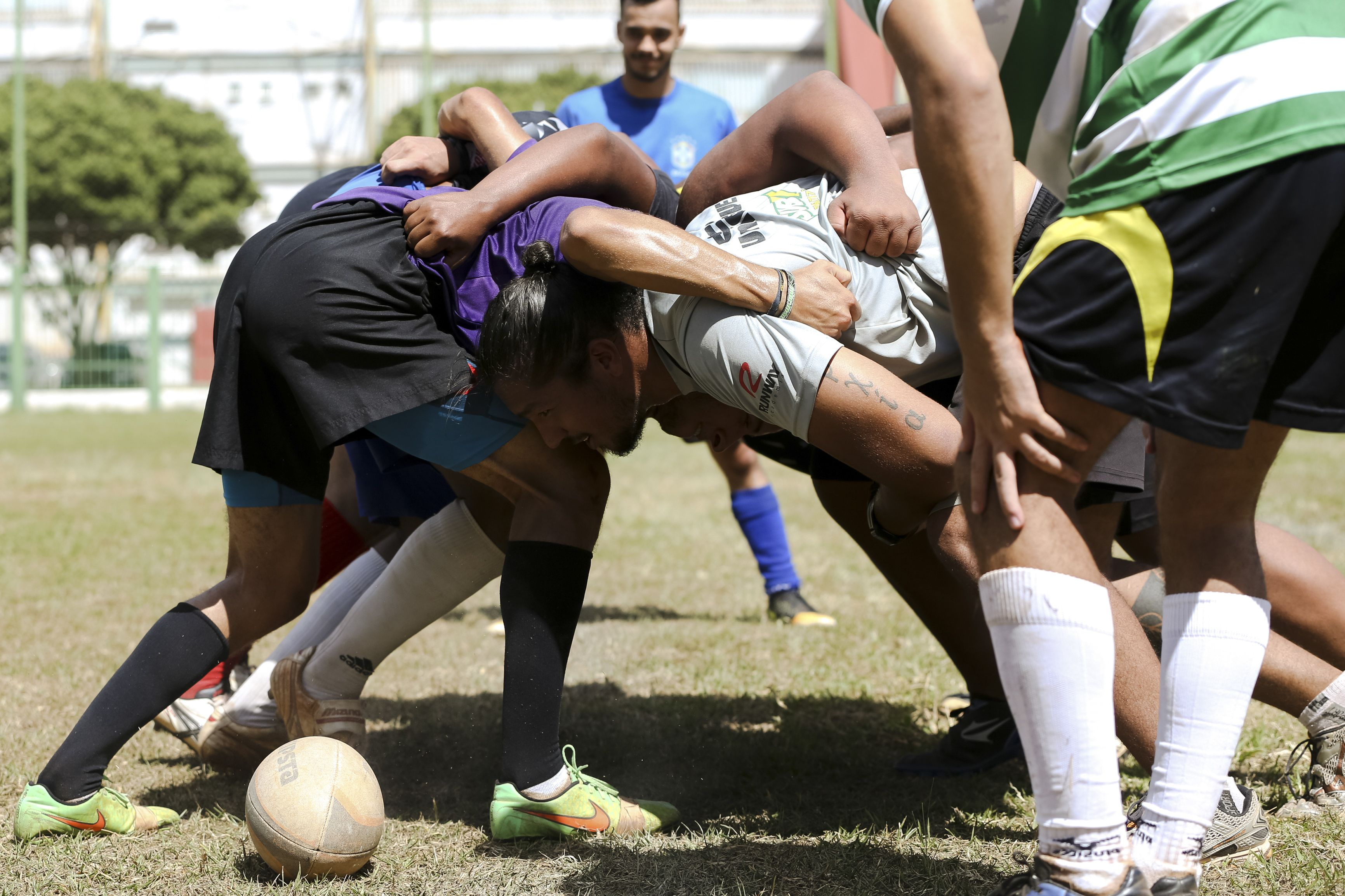 Brasília-Time de rugby do Uniceub treina em centro universitário de Brasília